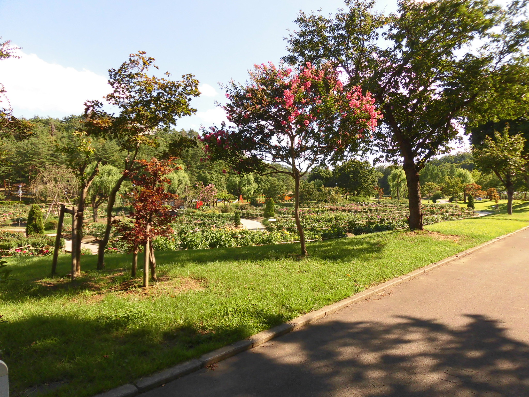 川西ダリヤ園。山形県東置賜郡川西町に所在。 8月の園内の様子。